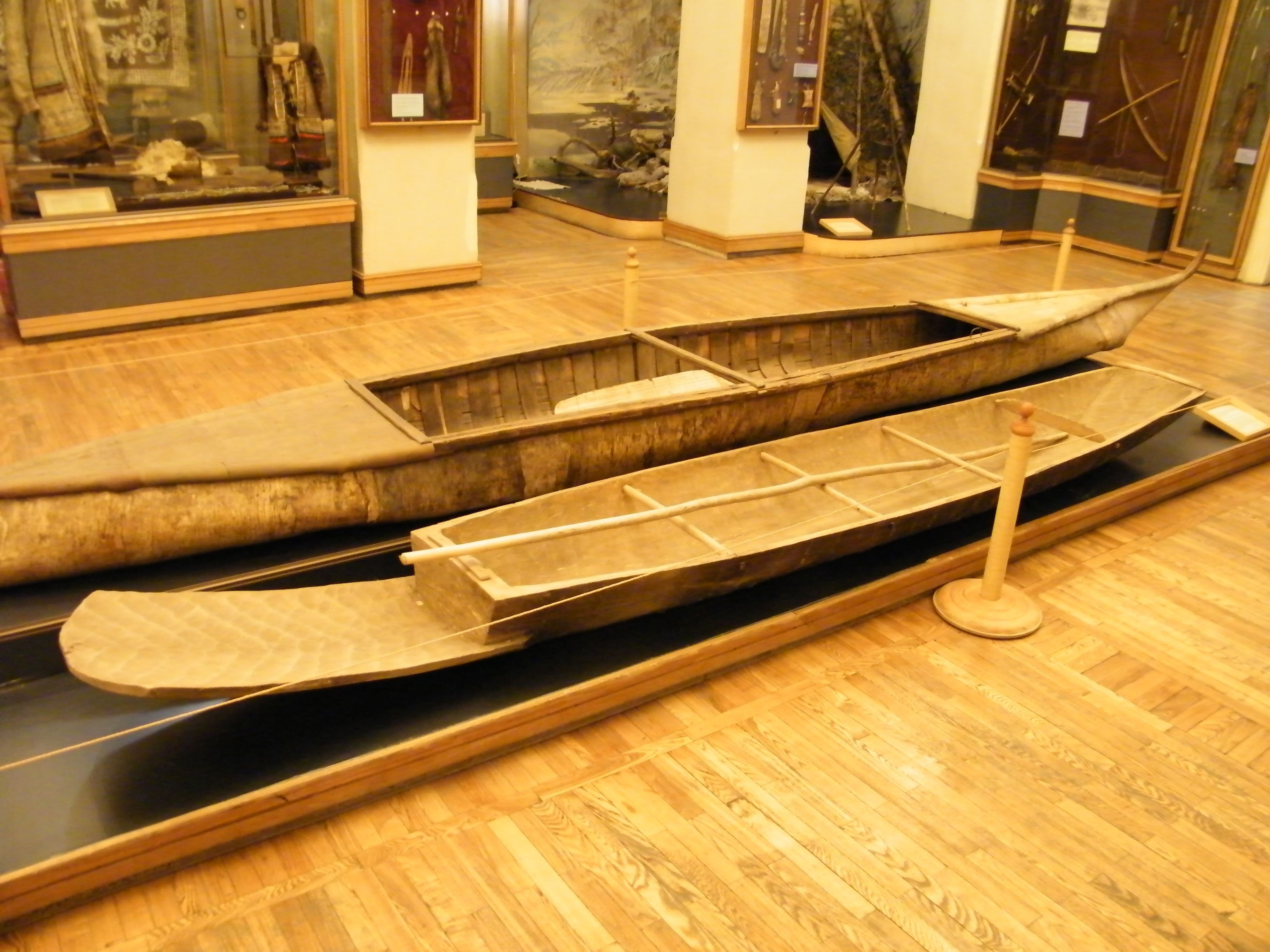 Удэгейский бат и нанайская оморочка